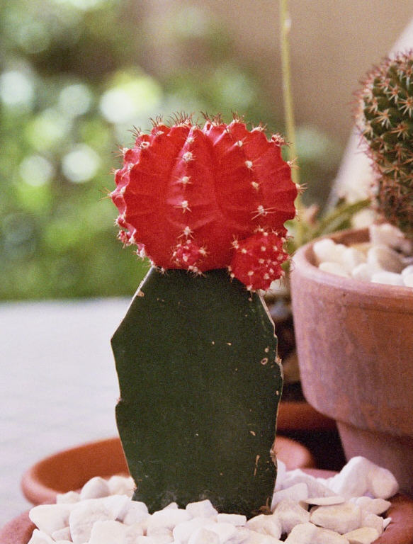 Gymnocalicium mihanowichii Hibotan, succulent plant